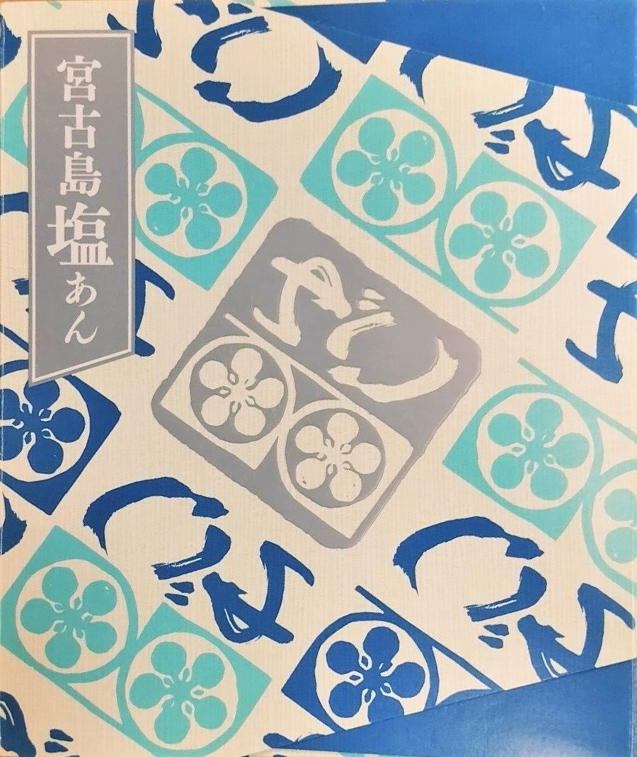 家伝ゆべし塩あん入り６個入箱